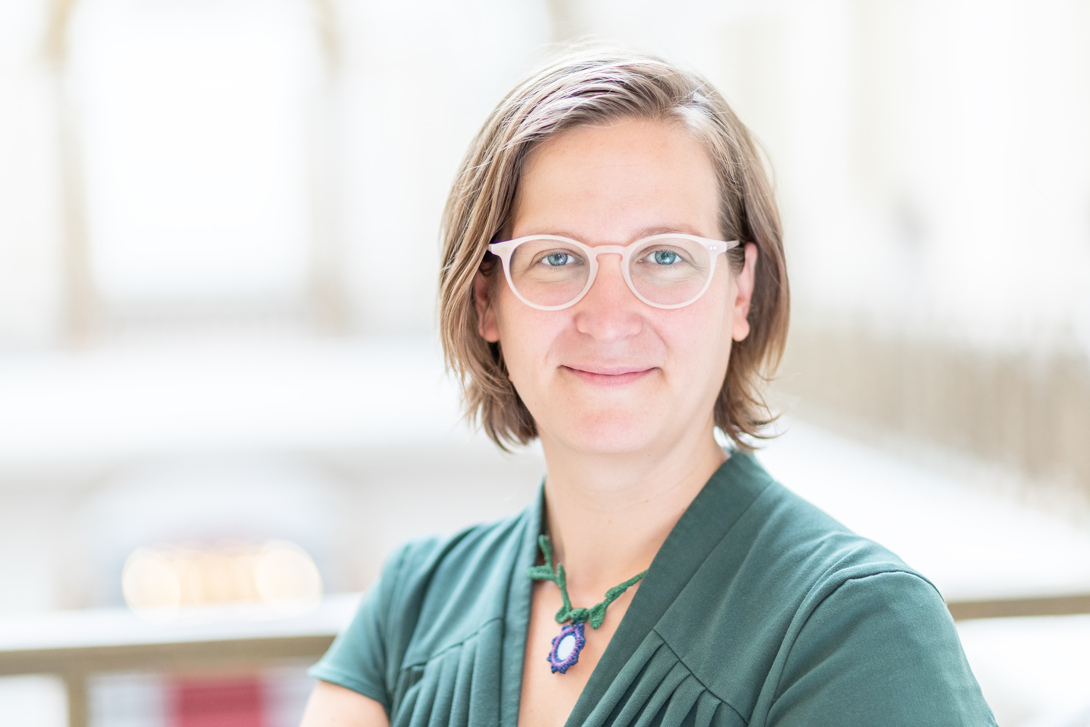 Silke Gebel, Abgeordnete der Grünen-Fraktion Berlin